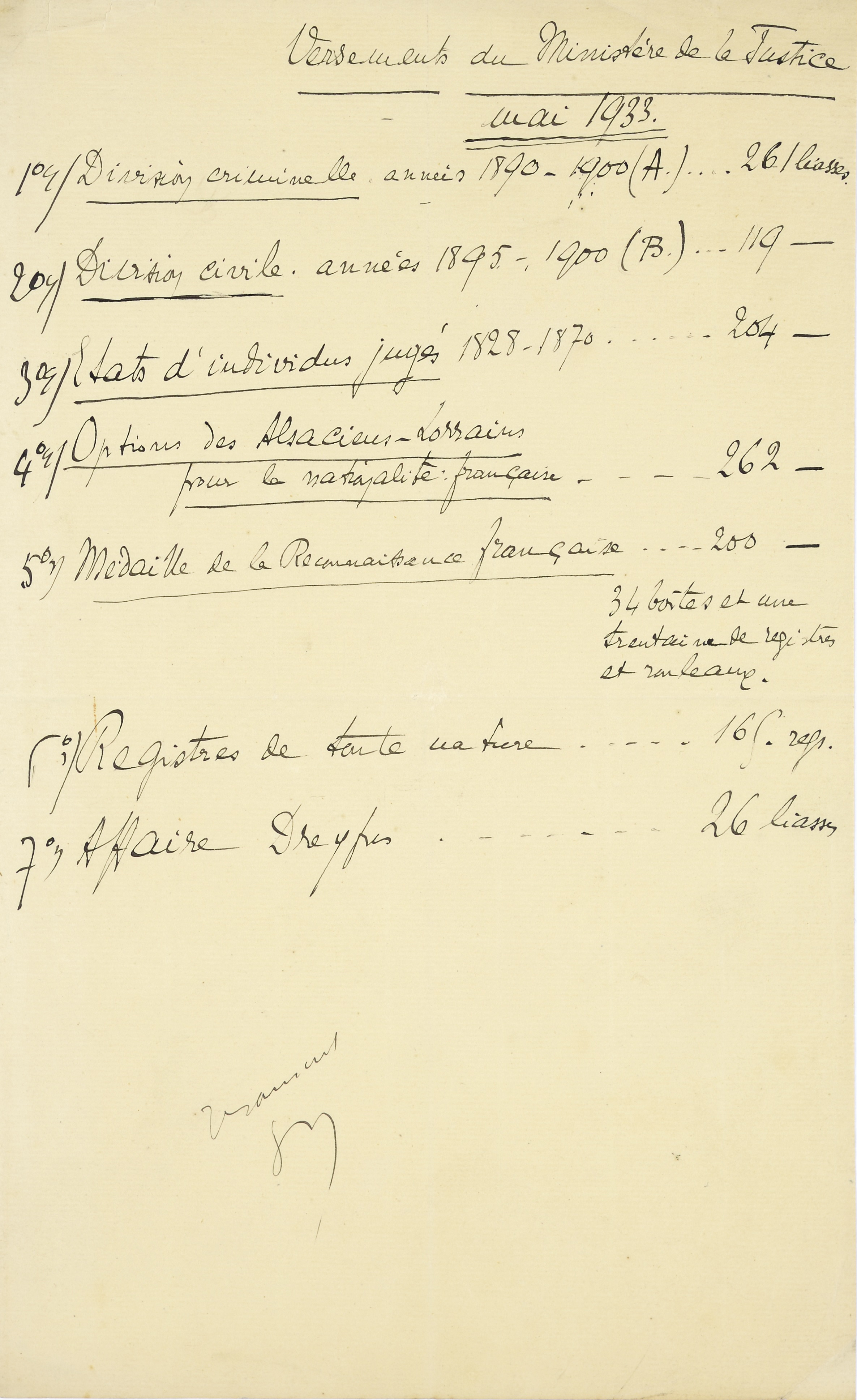 Listes des versements aux Archives, par le ministère de la Justice, des scellés de l’affaire Dreyfus